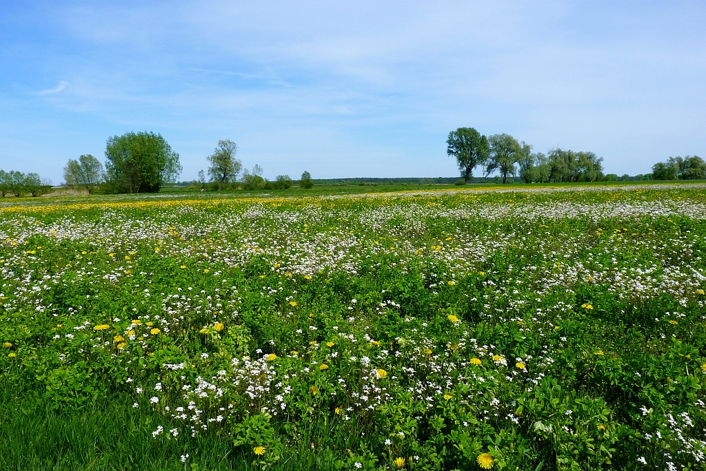 Obszar IBA nr 145 Dolina Słudwi i Przysowy, teren wsi Zagroby (gm. Żychlin)